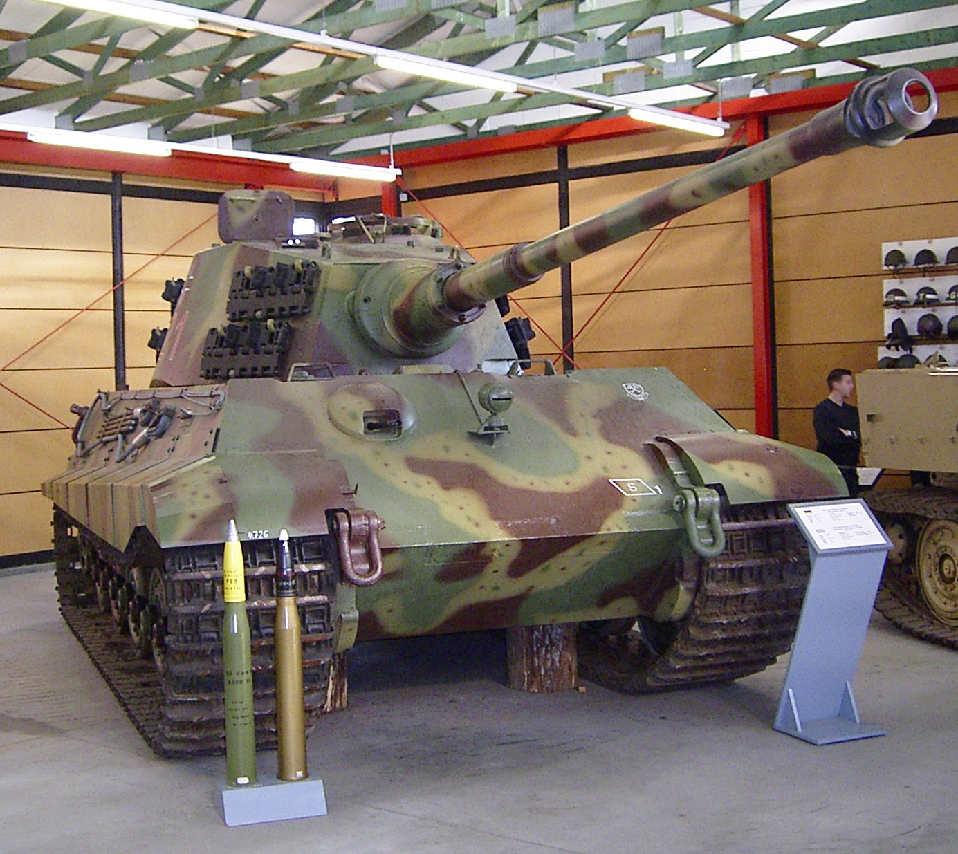 Panzer VI (Tiger II) mit Produktionsturm im Deutschen Panzermuseum Munster. Bau Juli 1944 (Henschel). Einsatz bei 1./schwPzAbtlg 101. Im Vordergrund zwei Granatpatronen für die 8,8-cm-KwK 43 L/71.